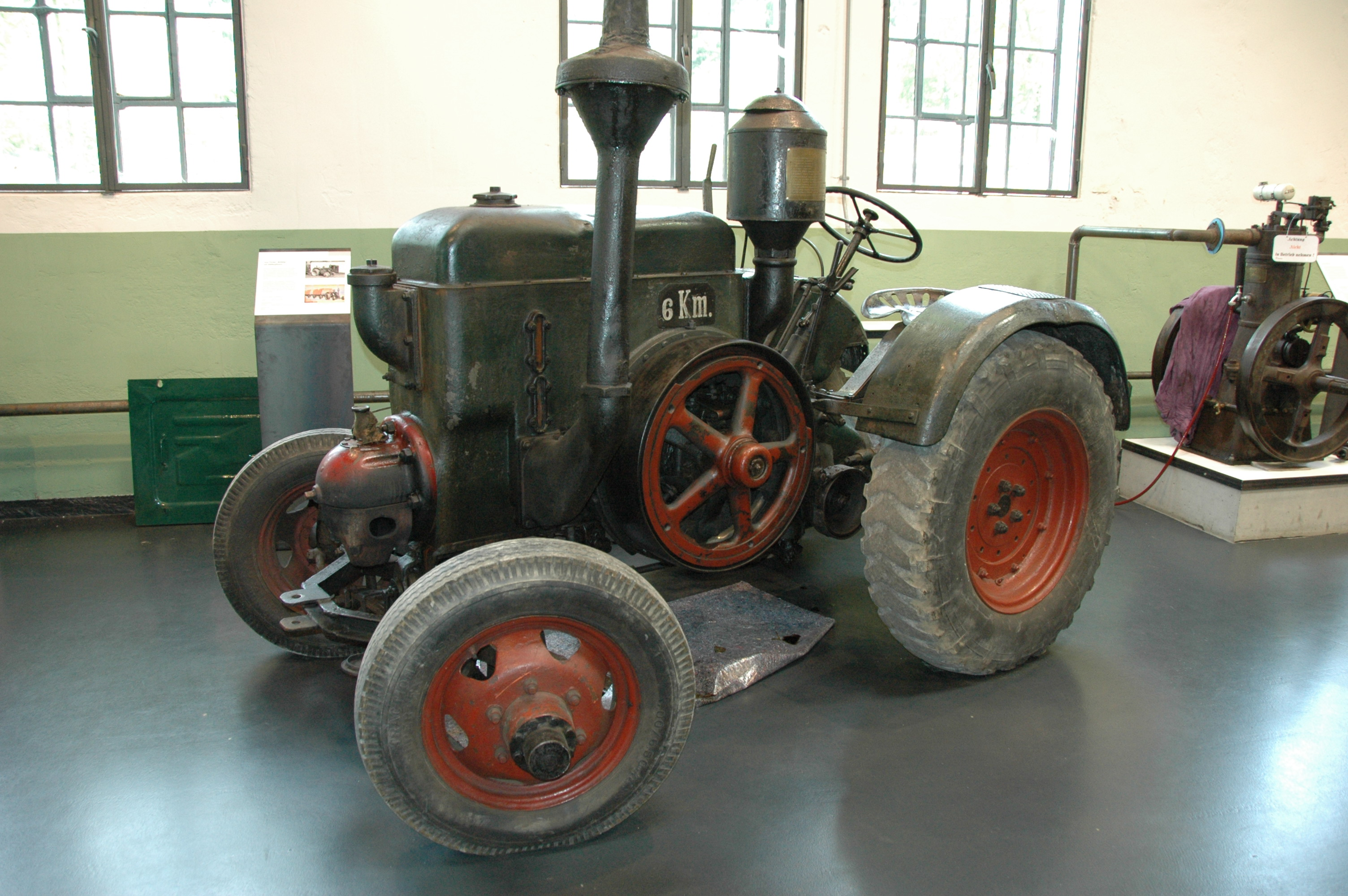 Lanz tractor type Bulldog HR2, bouwjaar ongeveer 1928, Maschinen und Heimatmuseum, Eslohe